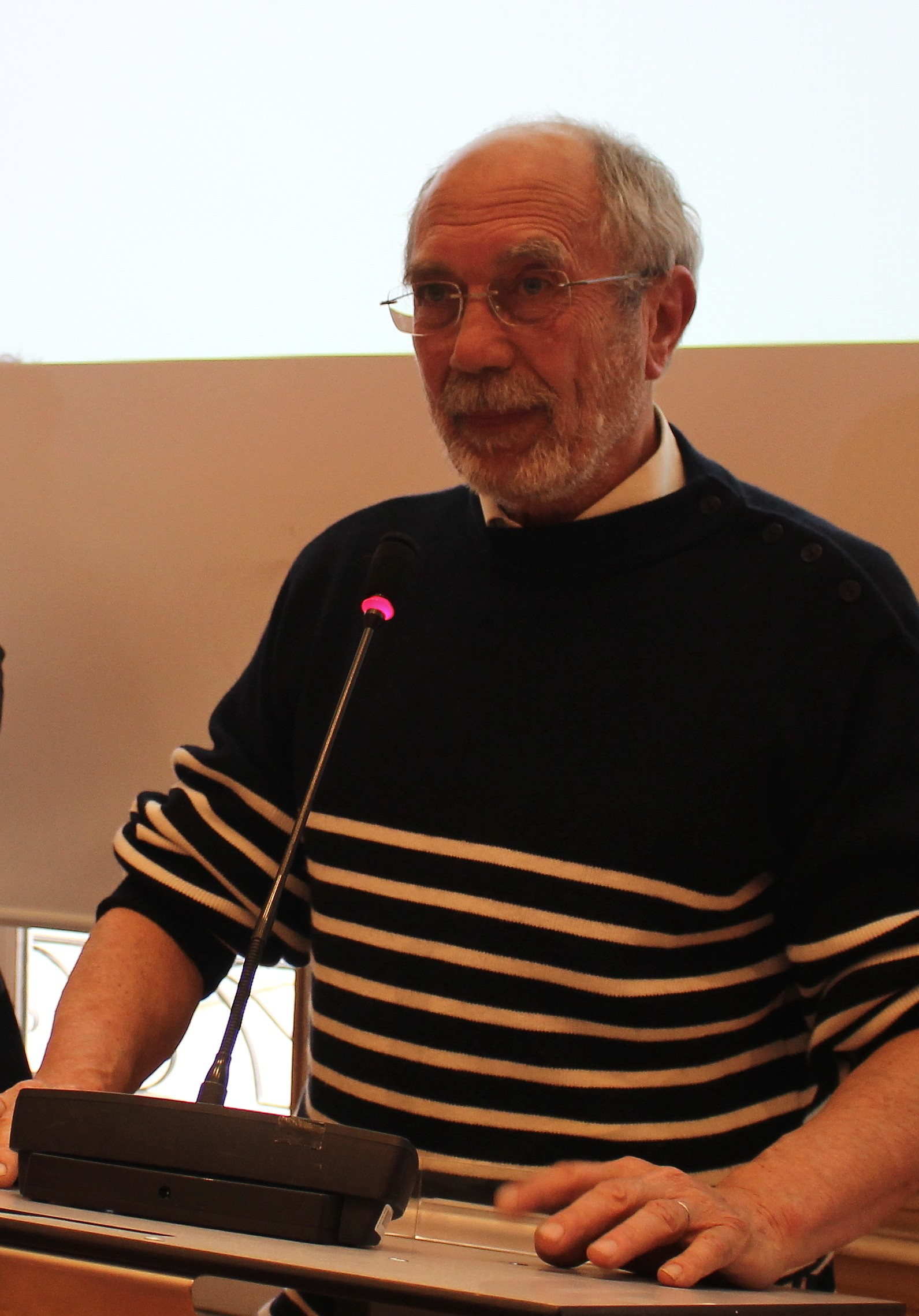 Féodor Atkine au Grand Prix du livre audio 2015